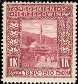 Timbre de Bosnien Herzegowina (Bosnie-Herzégovine, alors territoire autrichien) représentant une mosquée de Sarajevo, 1910. Bosnie